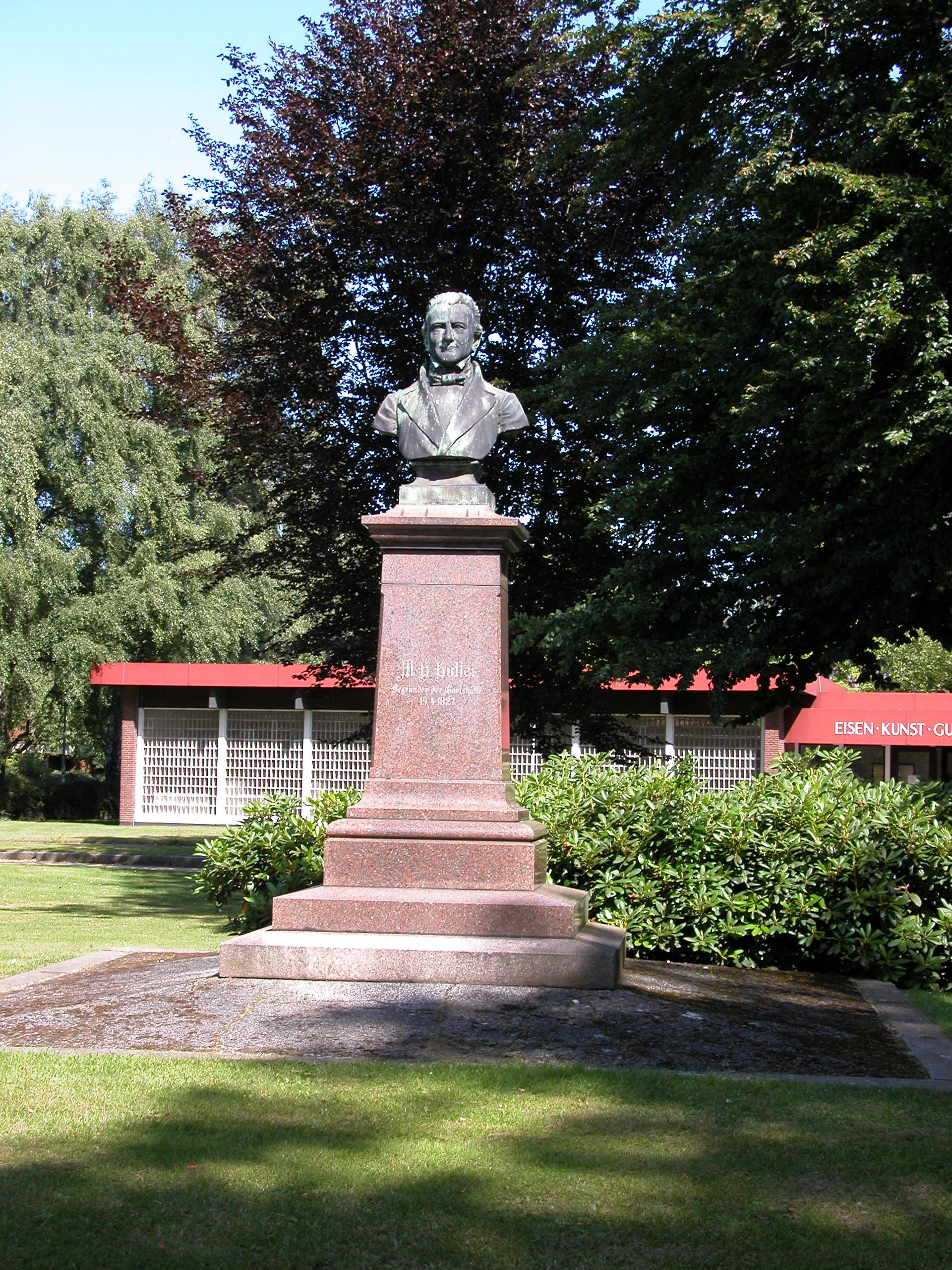 Das Marcus Hartwig Holler-Büstendenkmal vor dem Eisenkunstguß-Museum in Büdelsdorf bei Rendsburg. Die Büste wurde von der Aktiengesellschaft vorm. Gladenbeck in Berlin-Friedrichshagen gegossen. Eine Signatur des Künstlers habe ich nicht gefunden.